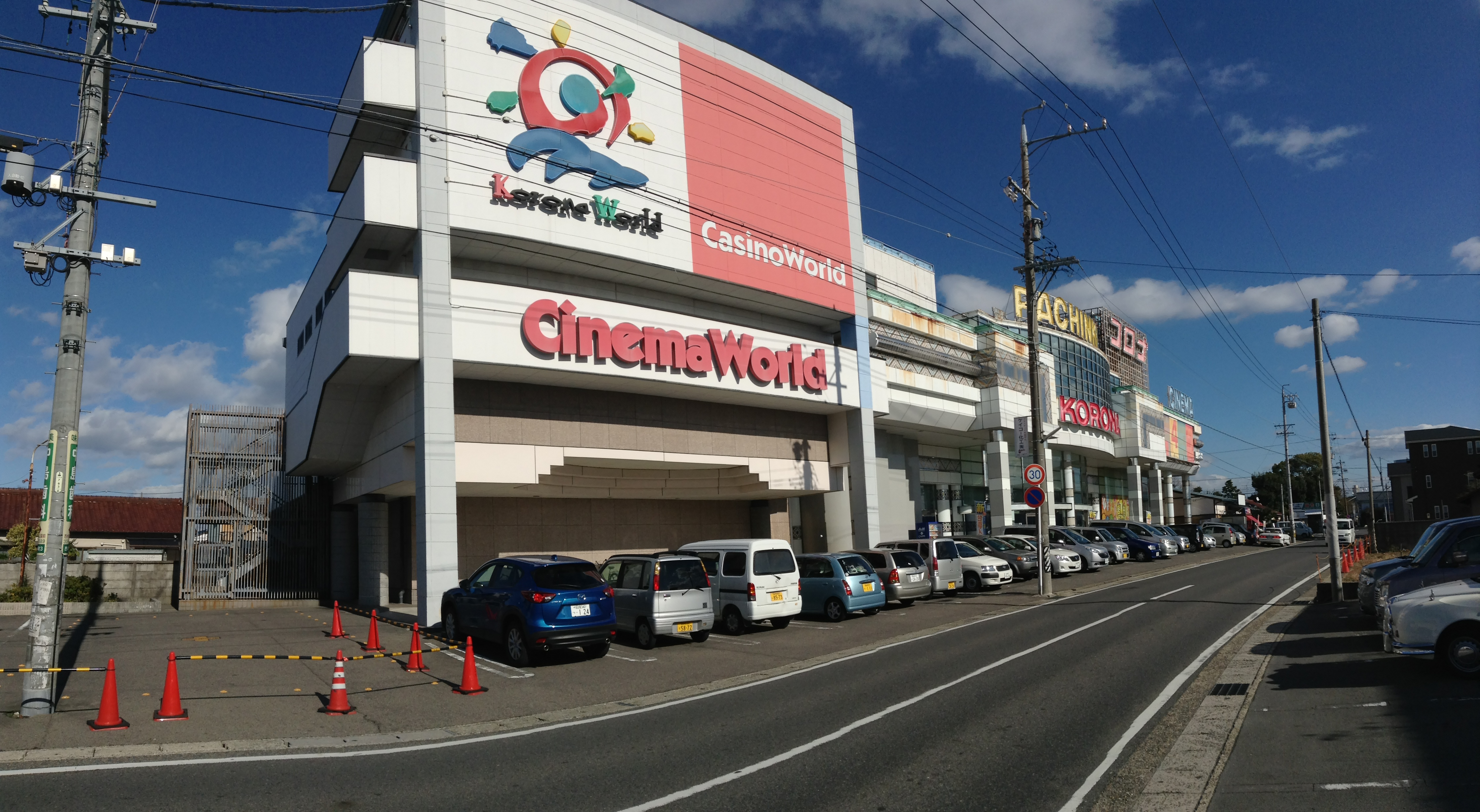 愛知県春日井市西本町にある春日井コロナワールドを南西側からi-Podのパノラマ撮影機能を利用して撮影。